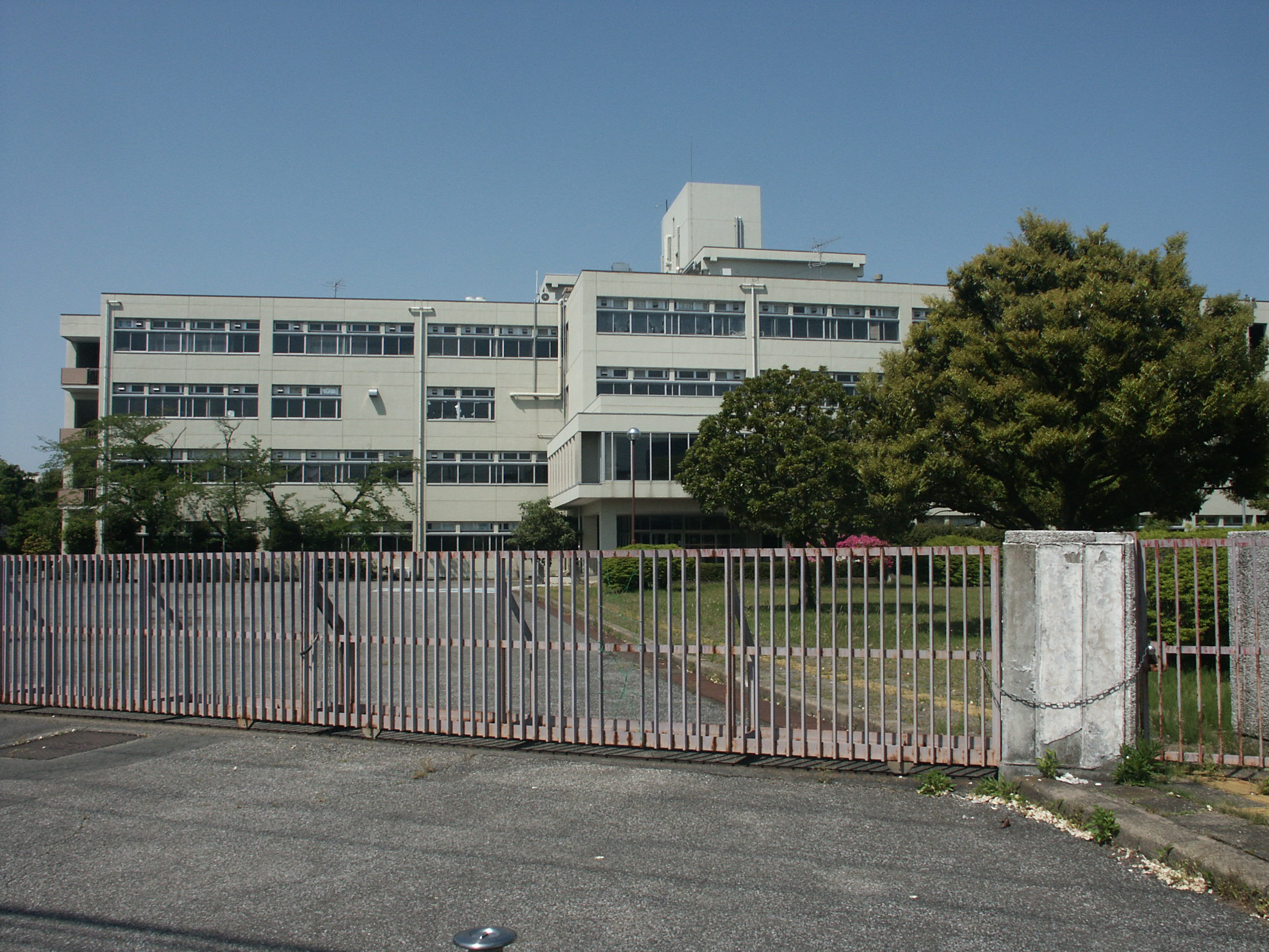 さいたま市桜区にある埼玉県公害センター旧庁舎